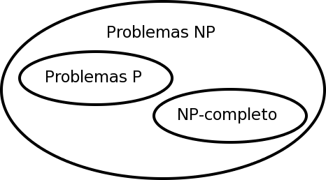 Diagrama de la clase NP (Dibujo original)